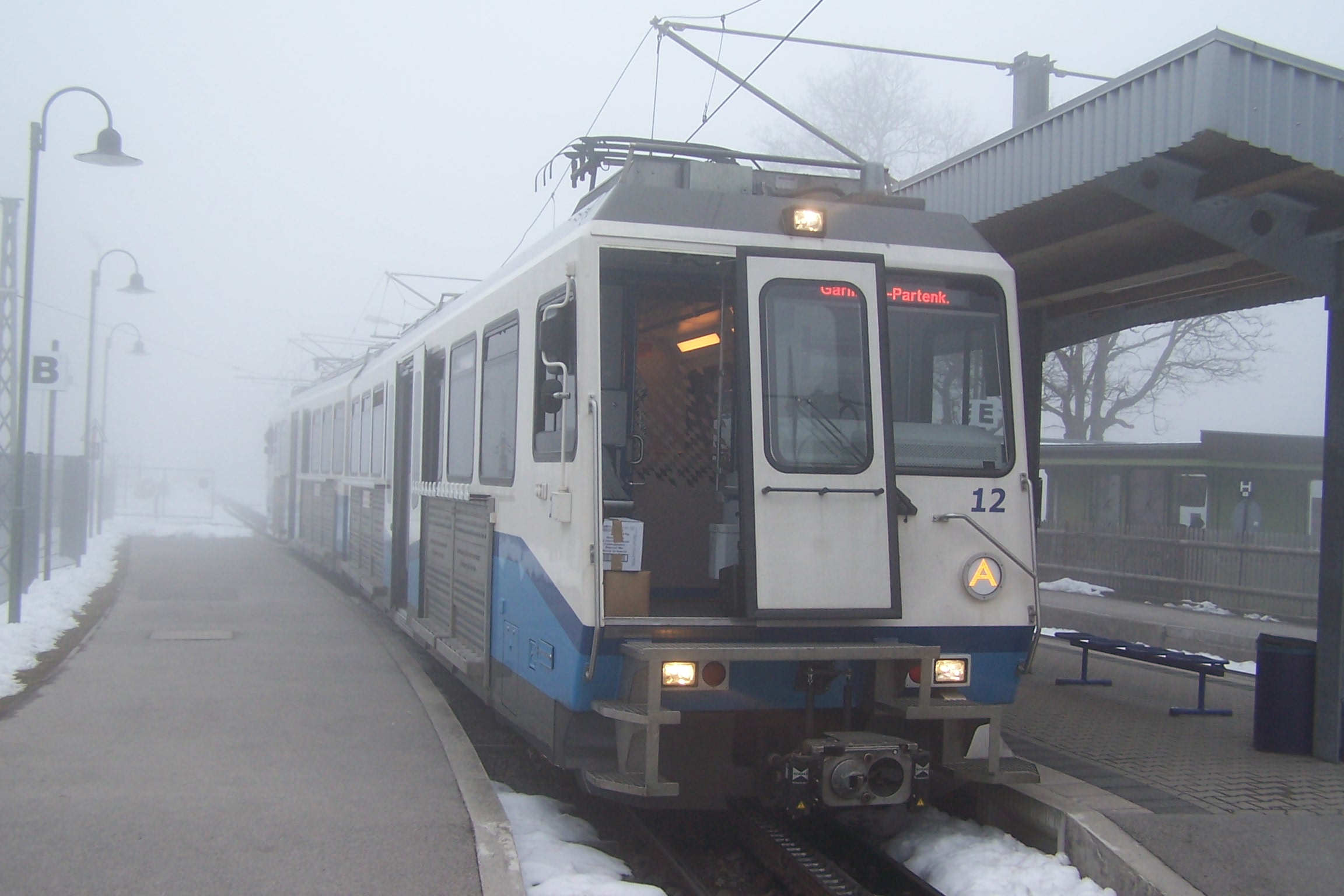 Triebwagen 12 der BZB im Bahnhof Eibsee.